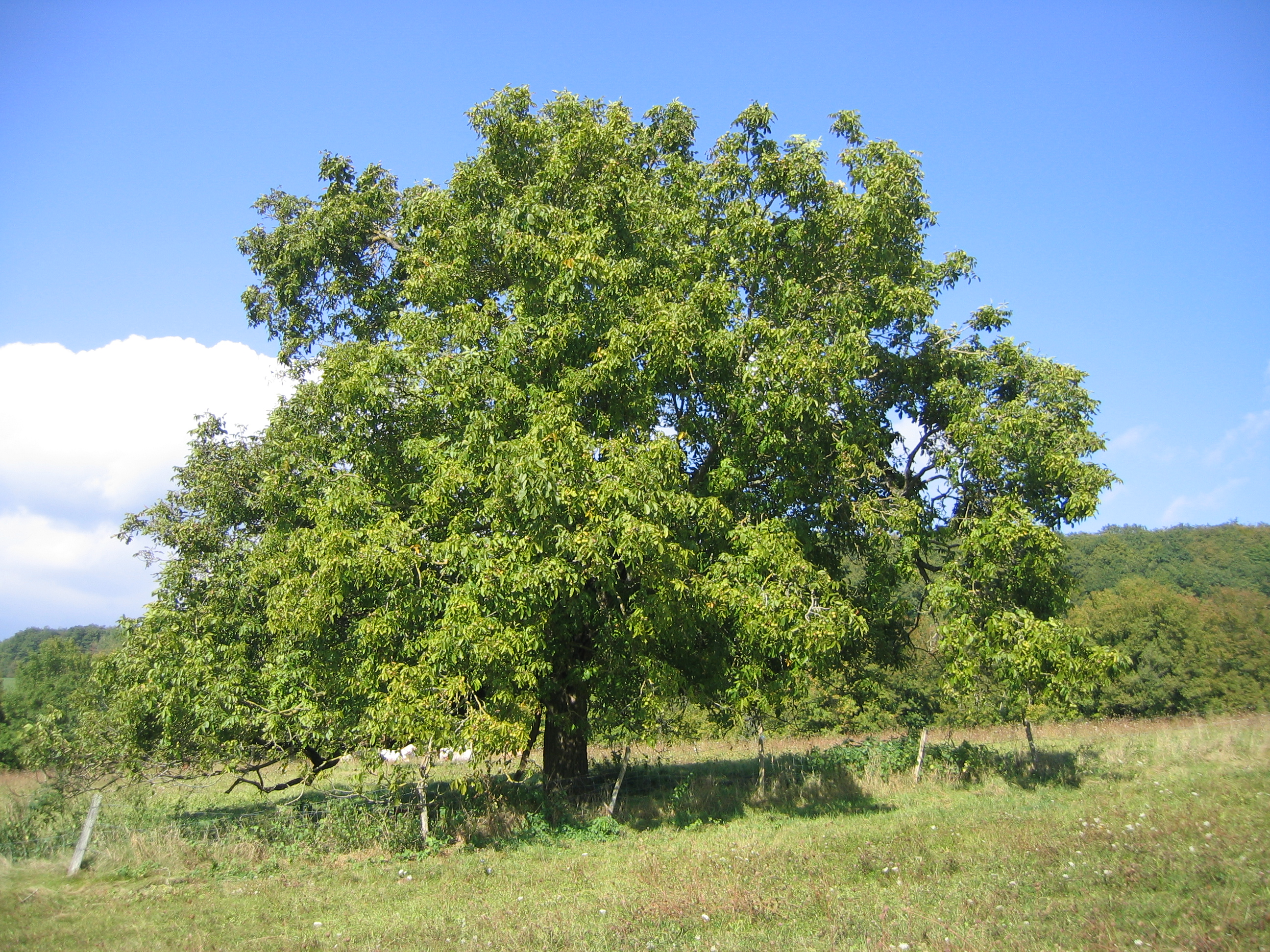 noyer centenaire en automne (Juglans regia)